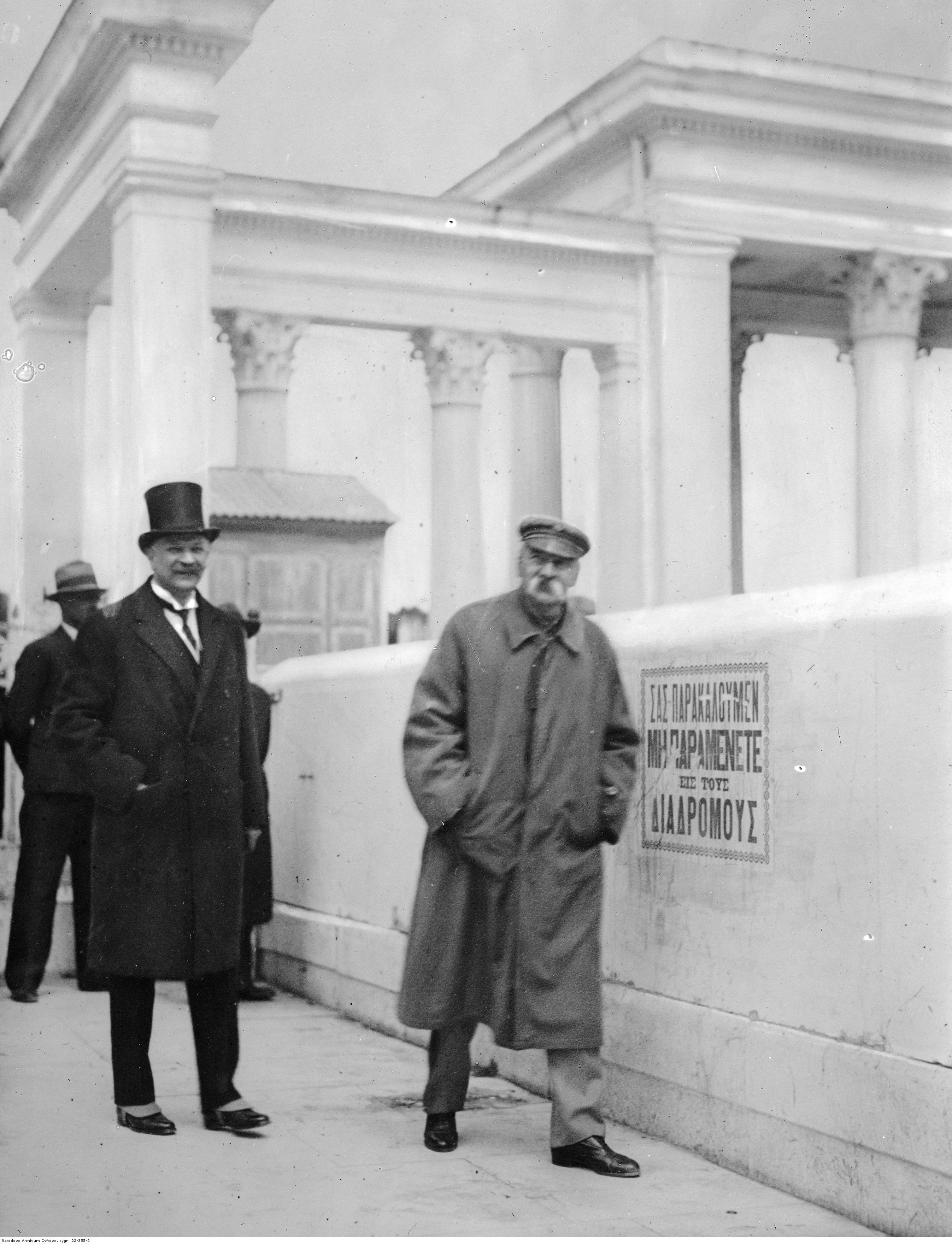 Józef Piłsudski w towarzystwie posła polskiego w Atenach Pawła Jurjewicza zwiedza Stadion Olimpijski w Atenach.